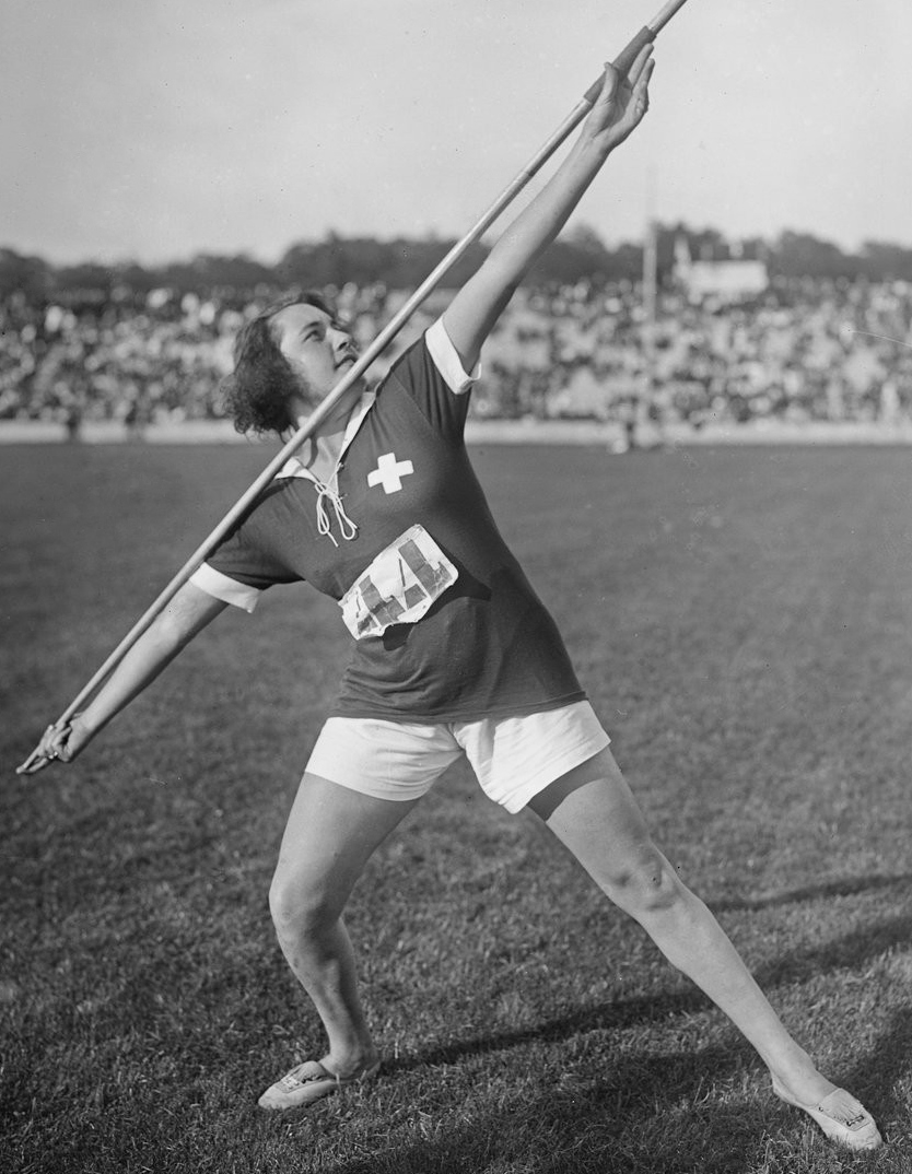 20-8-22, stade Pershing, Mlle [Fransesca] Pianzola (Suisse), gagnante du lancement de javelot à 2 mains [meeting international d'athlétisme féminin] : [photographie de presse] / [Agence Rol]